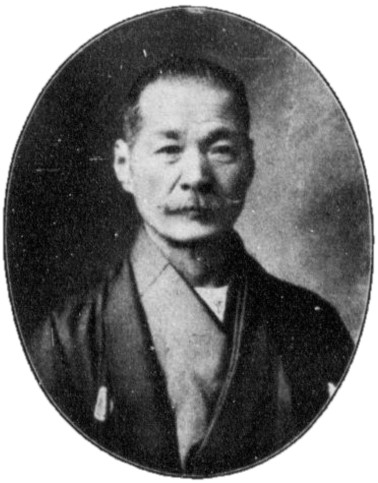 熱海孫十郎（1848～1924）